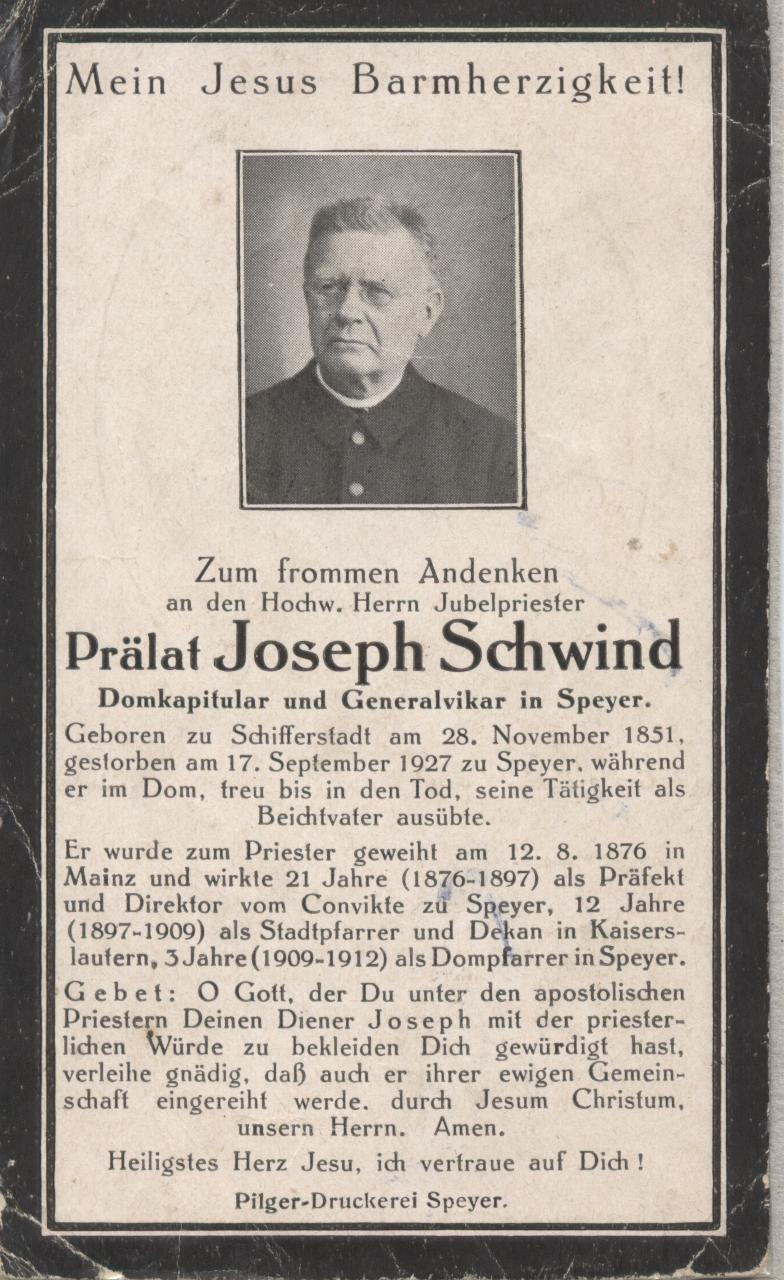 Domkapitular Joseph Schwind, Speyer, Sterbebildchen 1927